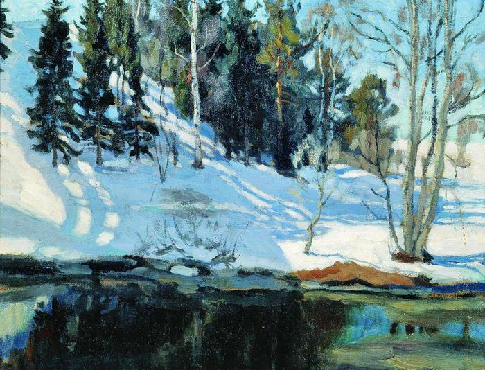 Под весенним солнцем